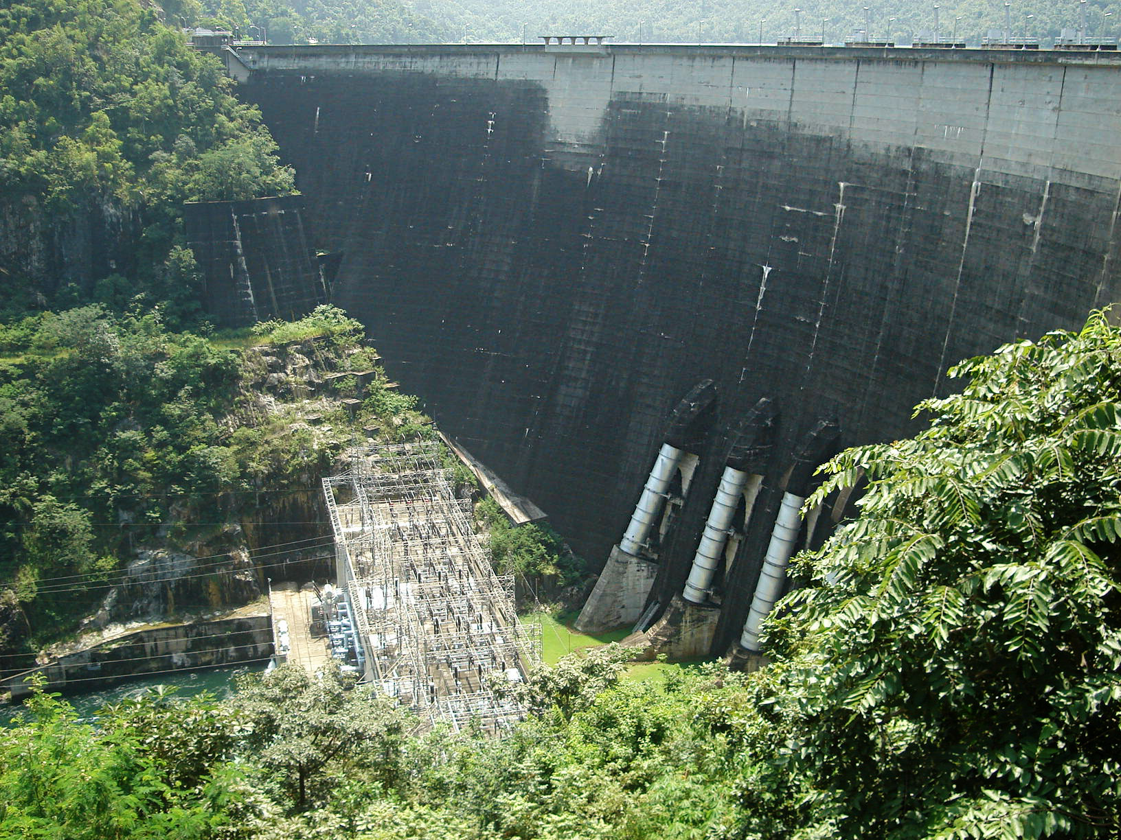 Bhumibol Dam (เขื่อนภูมิพล)